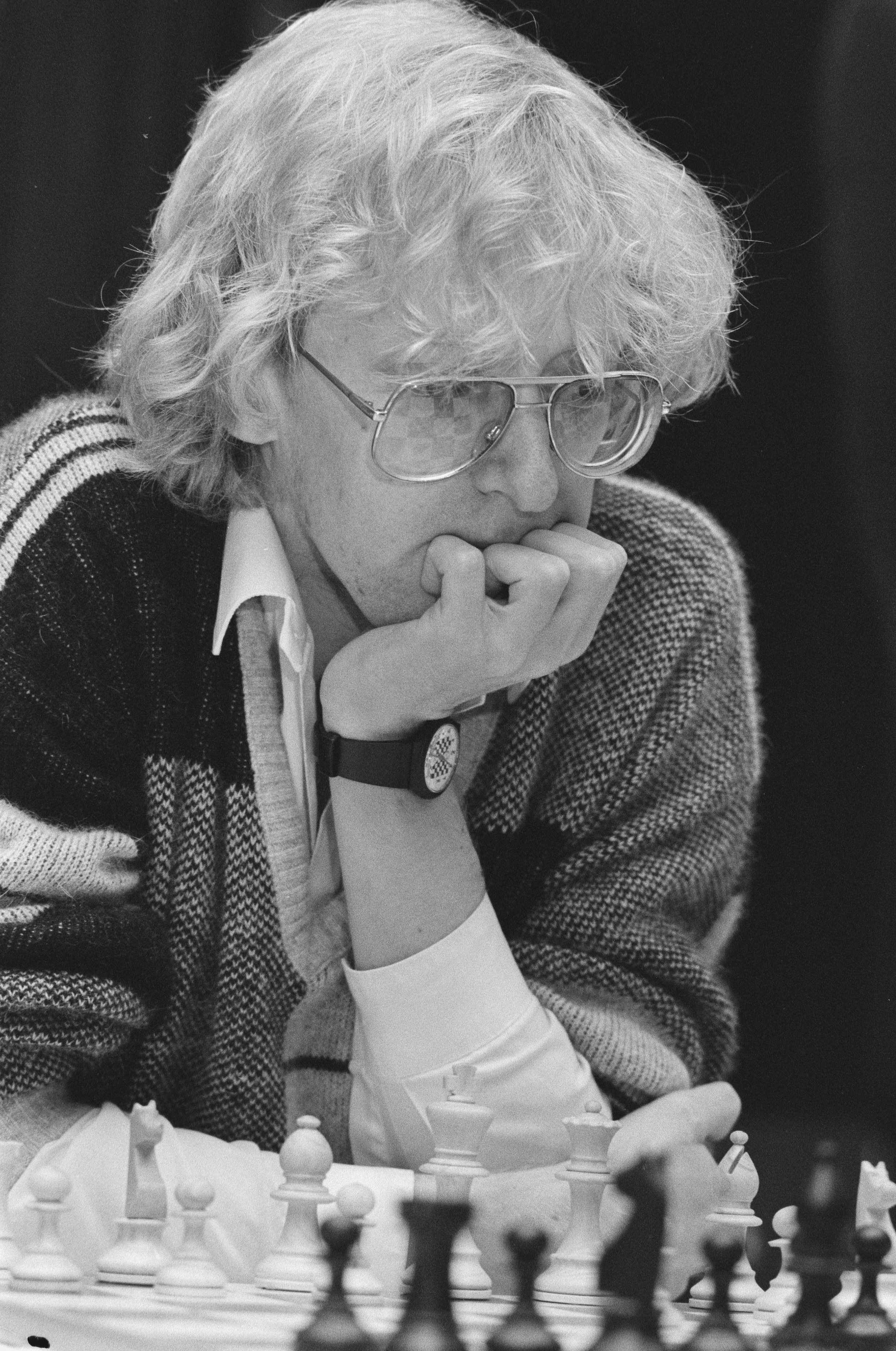 Collectie / Archief : Fotocollectie Anefo Reportage / Serie : [ onbekend ] Beschrijving : Ohra schaaktoernooi, 3e ronde; Chandler in actie Datum : 4 augustus 1987 Trefwoorden : schaken Instellingsnaam : OHRA Fotograaf : Bogaerts, Rob / Anefo Auteursrechthebbende : Nationaal Archief Materiaalsoort : Negatief (zwart/wit) Nummer archiefinventaris : bekijk toegang 2.24.01.05 Bestanddeelnummer : 934-0451